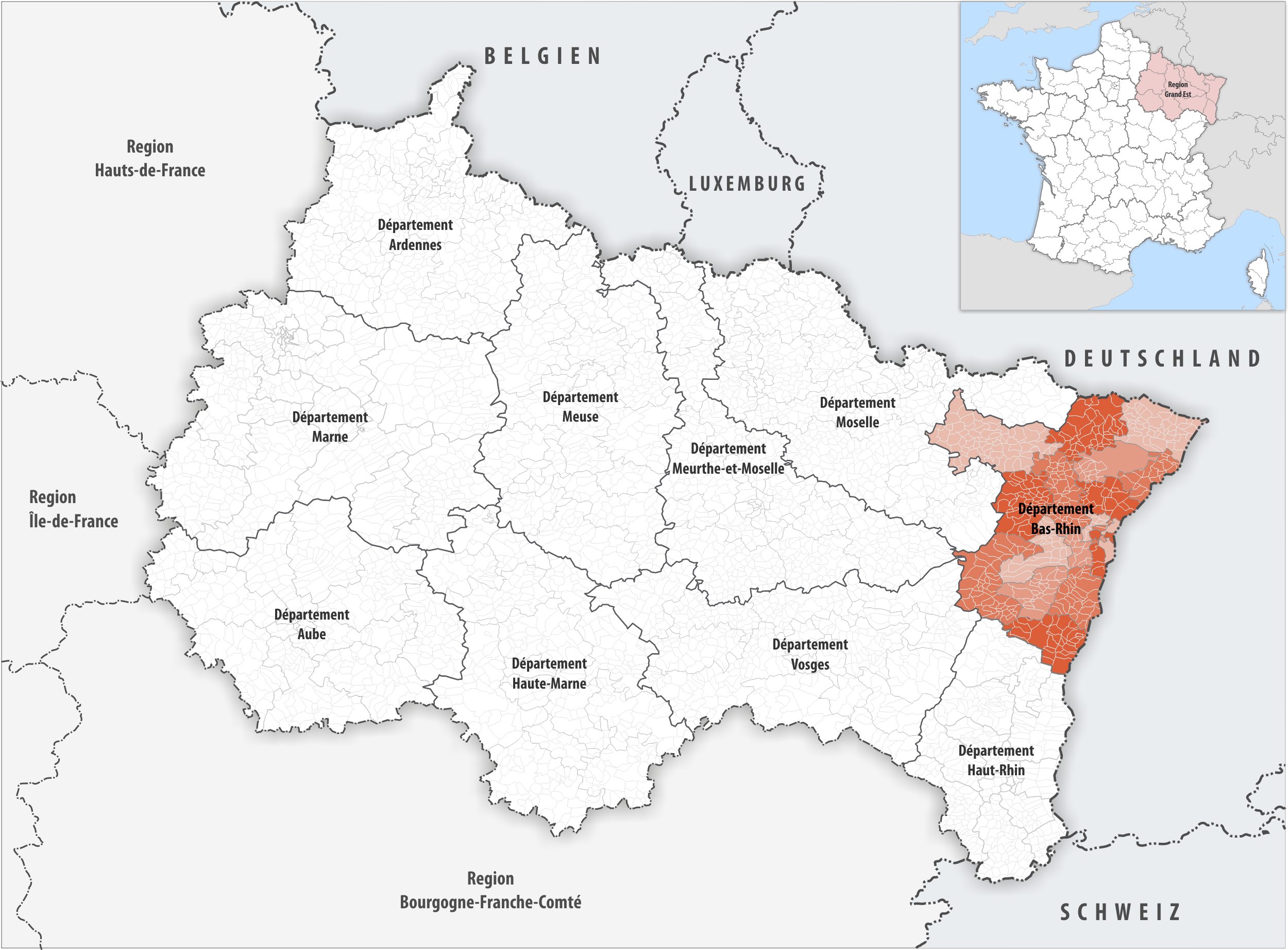 Lage des Departements Bas-Rhin